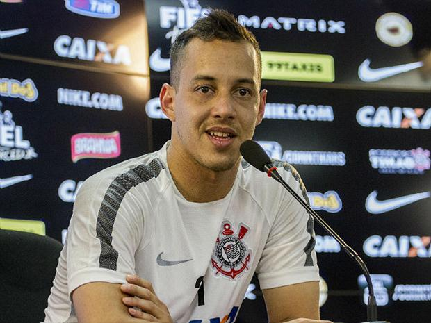 rodriguinho 2015